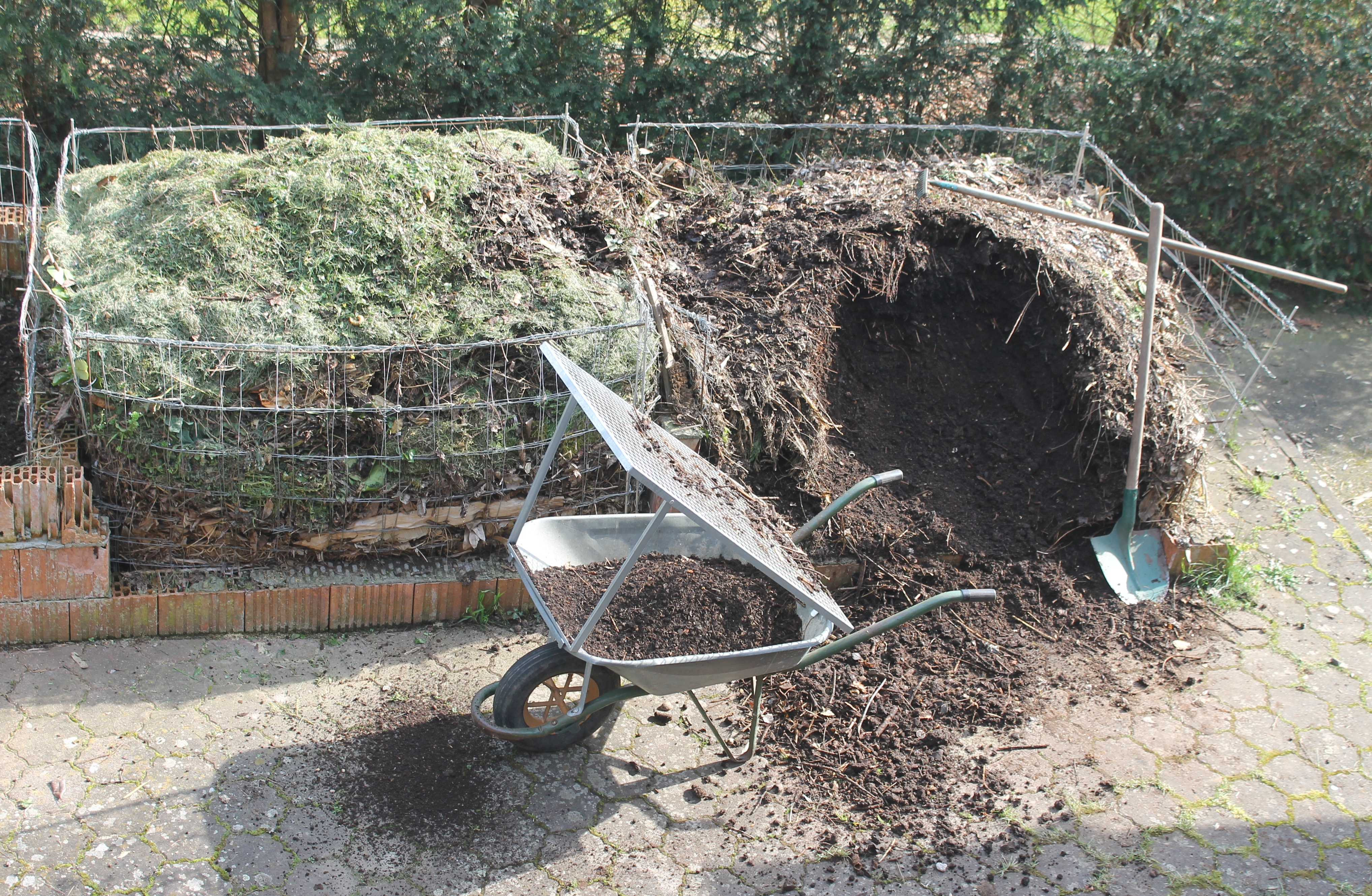 Alternierende Kompostierung I, "Anstich"